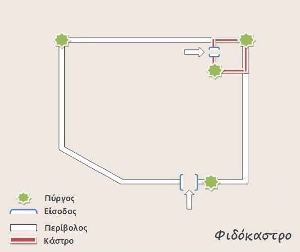 Aπεικόνιση του Φιδόκαστρου, σύμφωνα με πληροφορίες του Baker, Βασιλική Γεωγραφική Εταιρεία, 1837.